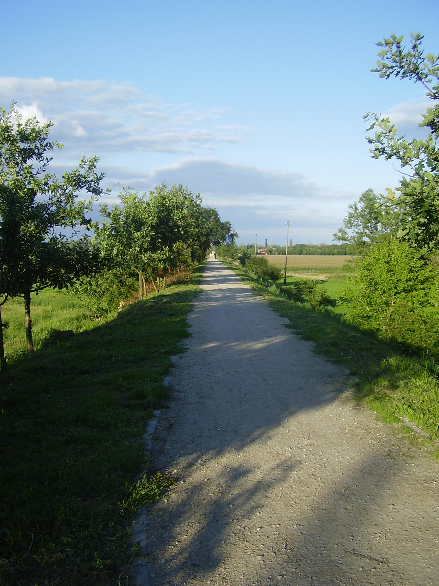 Trakt solny - ścieżka spacerowa - fragment prowadzący od zabytkowej warzelni soli do Tężni.